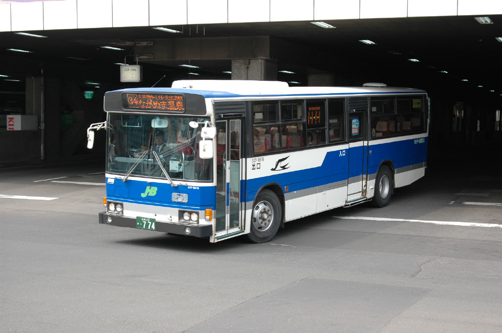 札幌駅発着当時の車両 2005-5-15